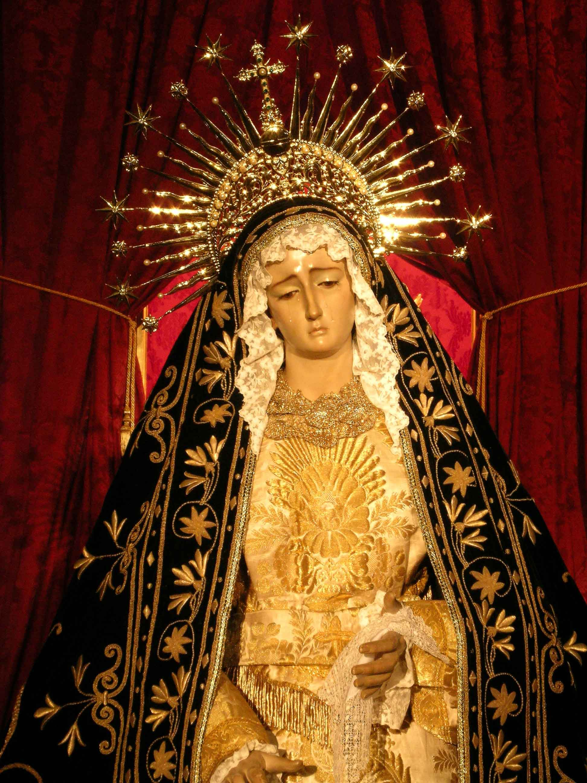 Virgen de la Soledad de Almería en su Besamanos del 15 de Septiembre